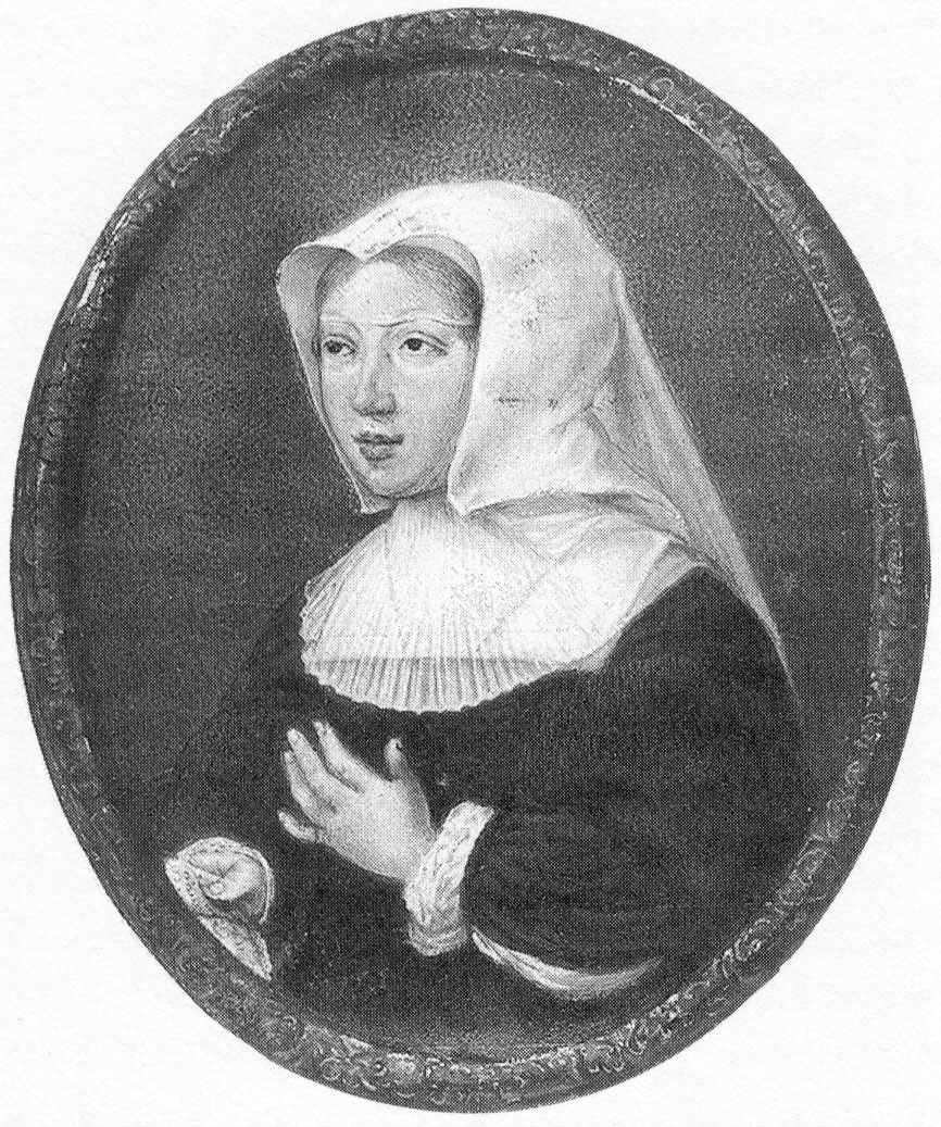 Margarete von Österreich (1480-1530)Tochter Maximilians I.Generalstatthalterin der Niederlande von 1507 - 1530